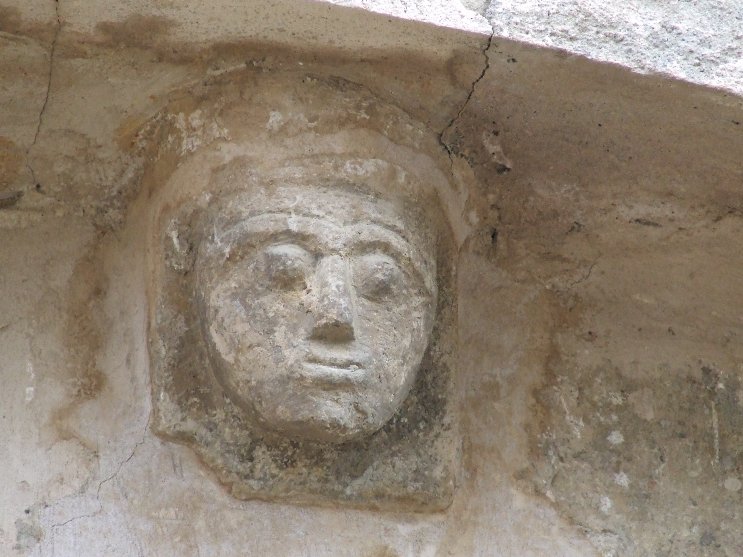 Petita escultura romànica de la Mare de Déu del Remei de Guàrdia de Noguera (Castell de Mur, Pallars Jussà)